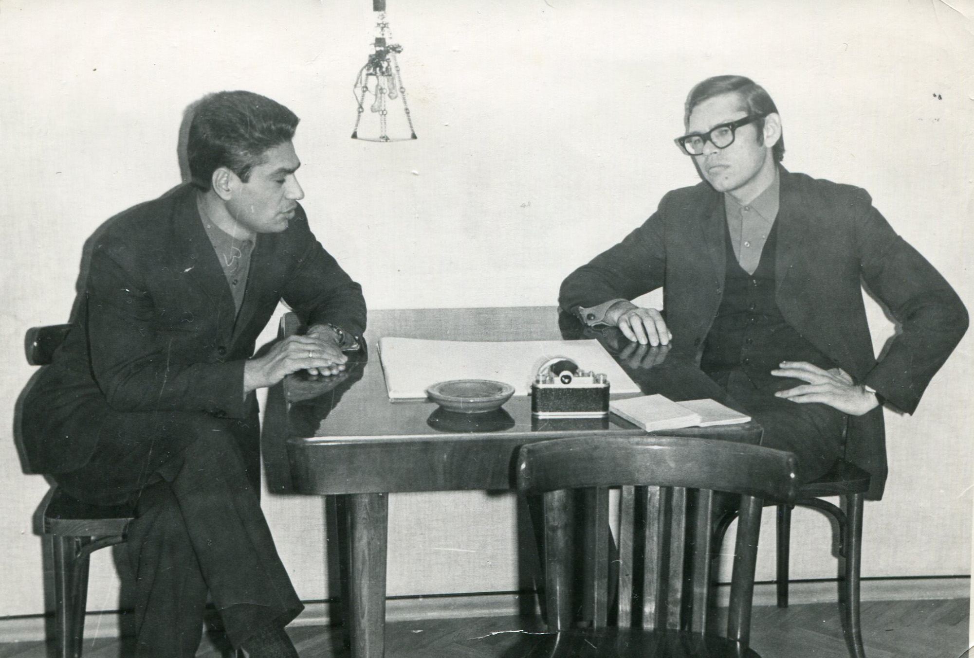 О. Королёв (справа) и М. Садыков (слева)